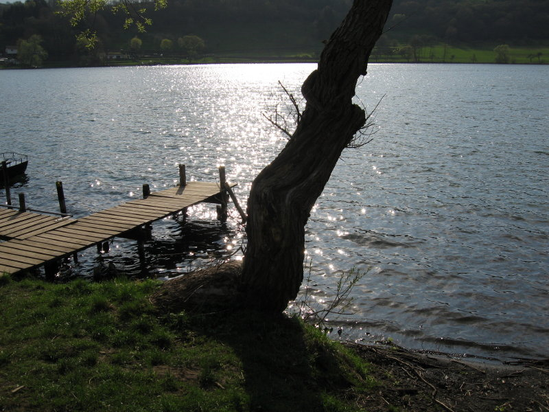 Sonnenuntergang am Schalkenmehrener Maar Andrea Heck April 2006